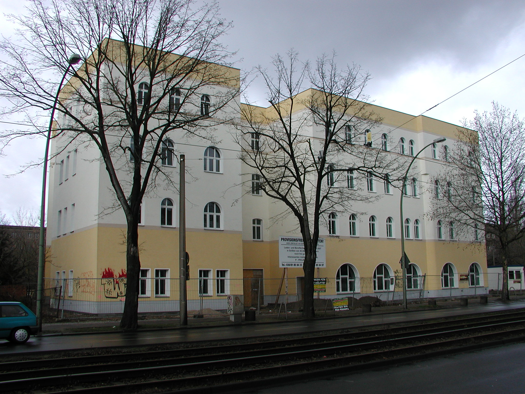 Botschaft (2)